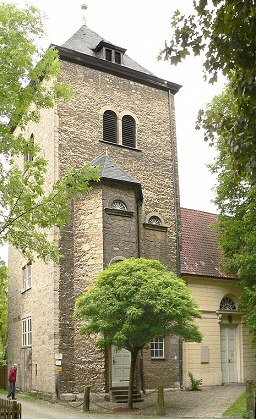 Kirche St. Marien in Alt-Wolfsburg Foto aufgenommen von Benutzer Benutzer:Axel Hindemith, Juni 2005